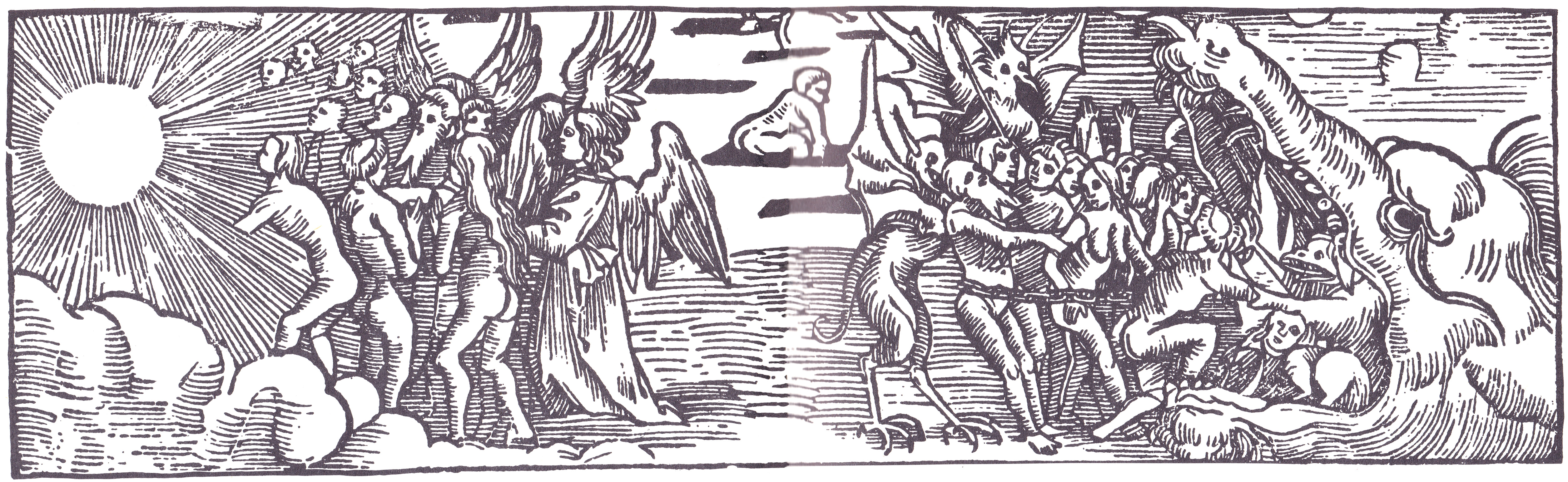 Paradise and hell. 16th century wood engraving.